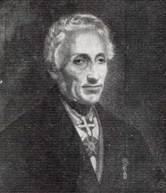 Ritratto non fotografico di Antonio Piola (1794 – 1868)